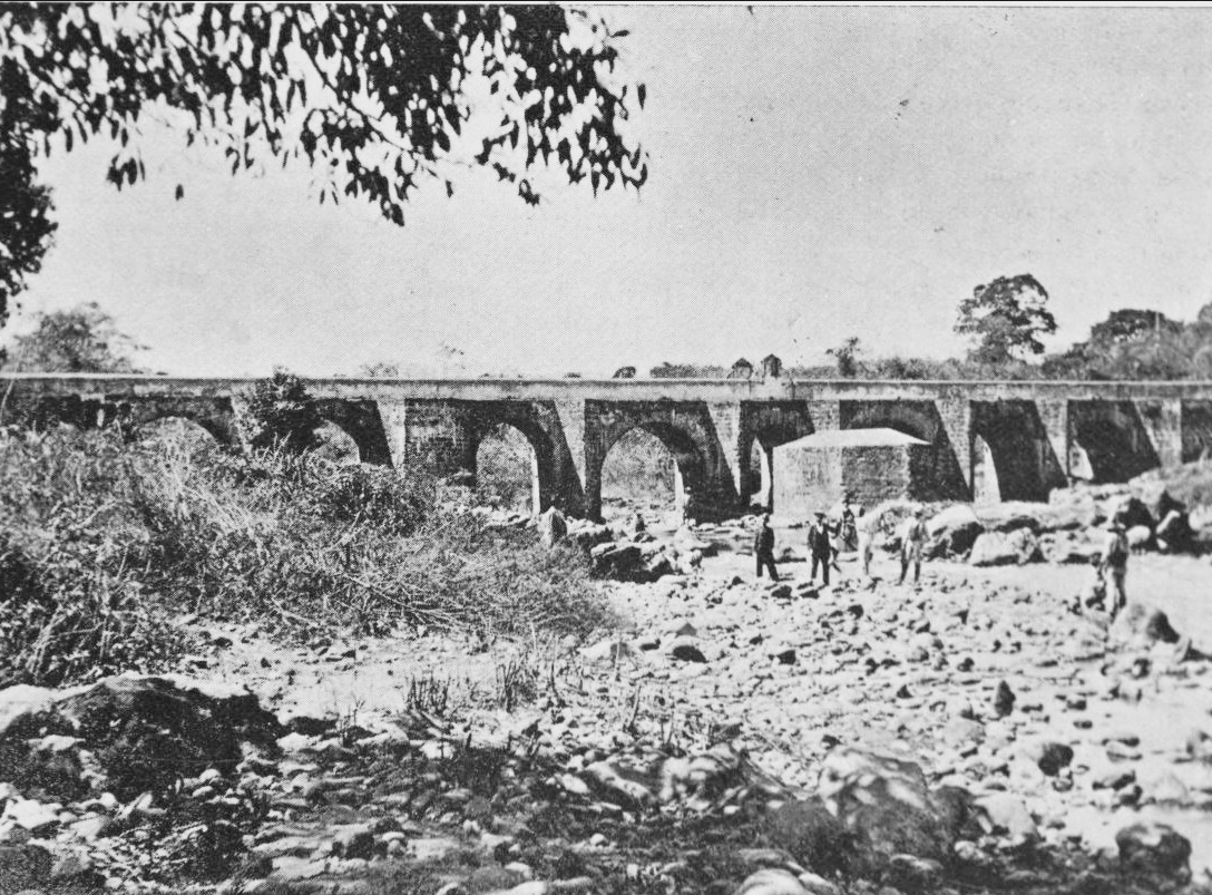 Puente sobre el río Los Esclavos en Santa Rosa, Guatemala. 1897